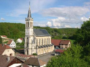 Village de Florimont - Église Photo prise en mai 2004 par LP90 17 aoû 2004 à 12:02 (CEST) Licence GFDL LP90 mai 2004